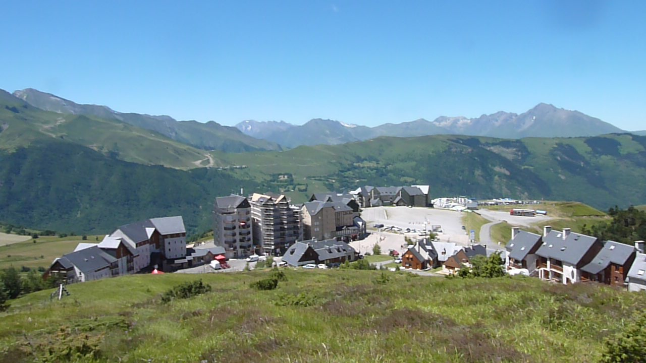 Vue de Peyresourde, versant en Hautes-Pyrénées de la station de Peyragudes.